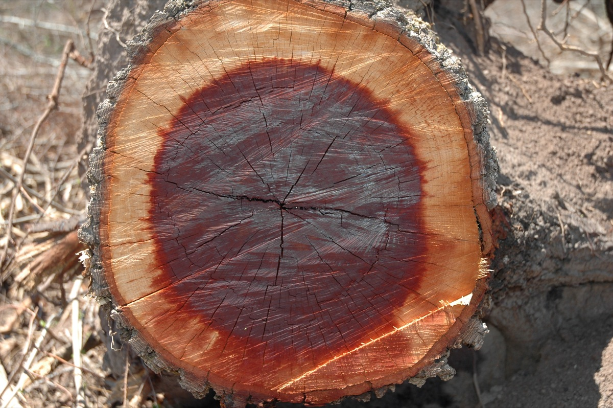 "Desmonte" entre Saenz Peña e Castelli. Schinopsis balansae (quebracho colorado).